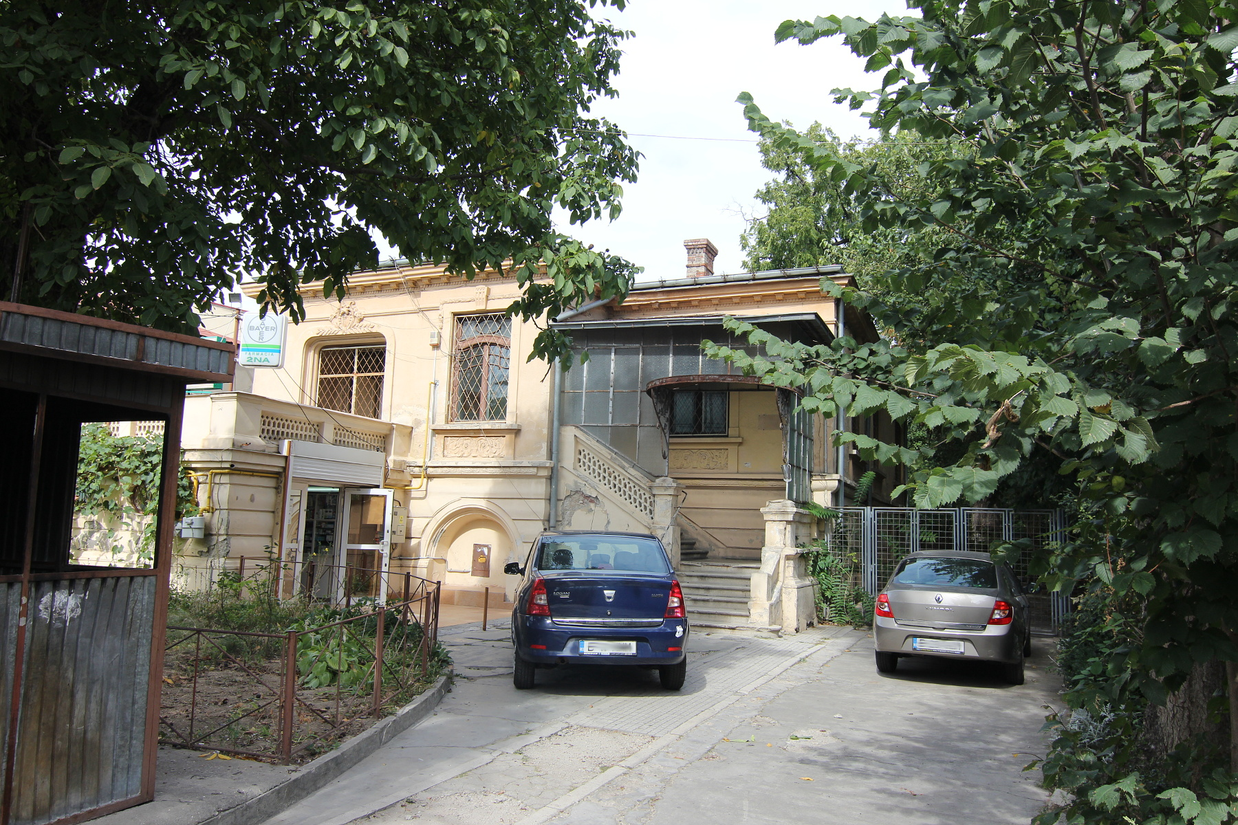 Casă pe Str Robescu